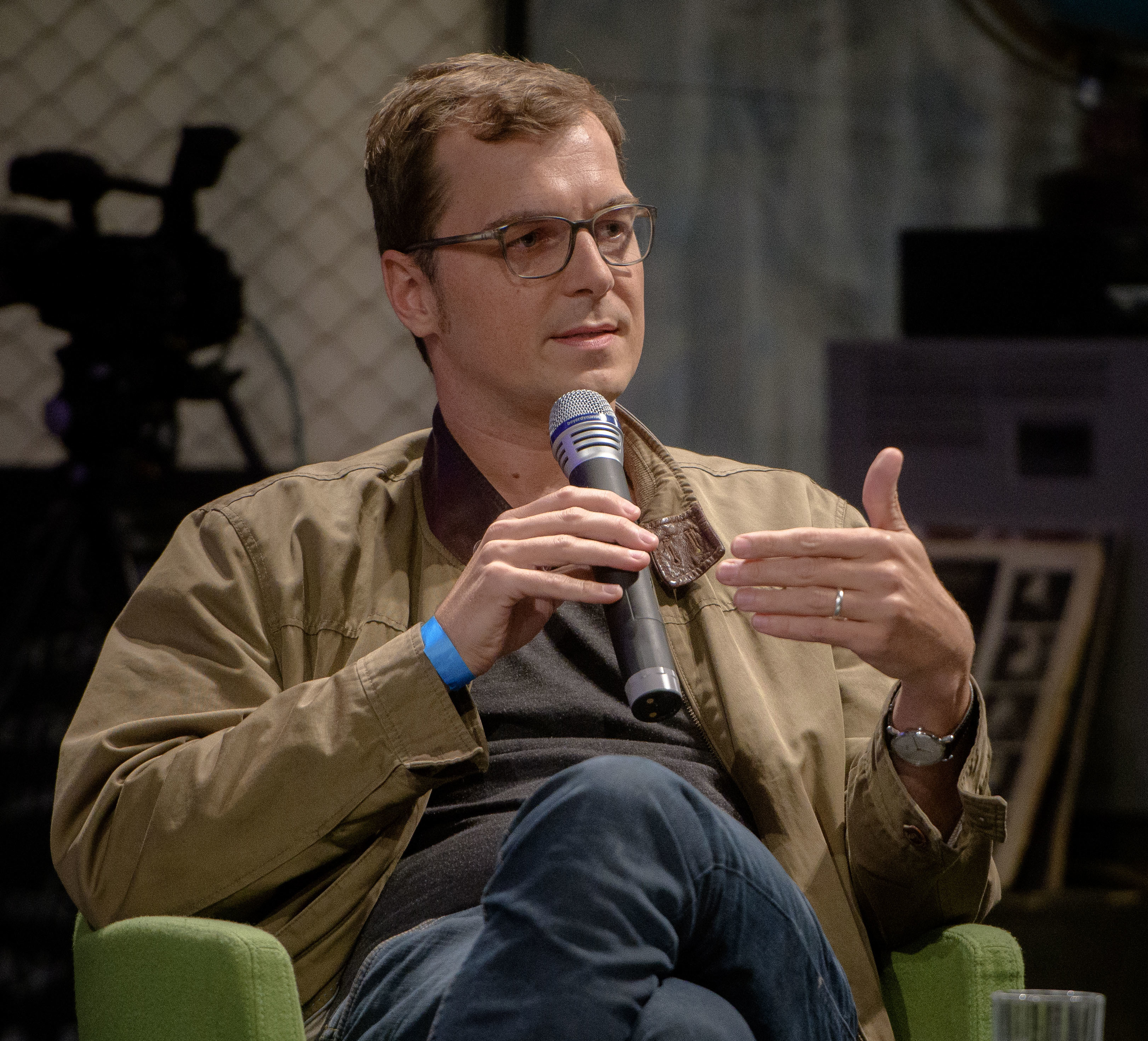 Martin Kaul (Reporter für soziale Bewegung, u.a. taz) Foto: stephan-roehl.de